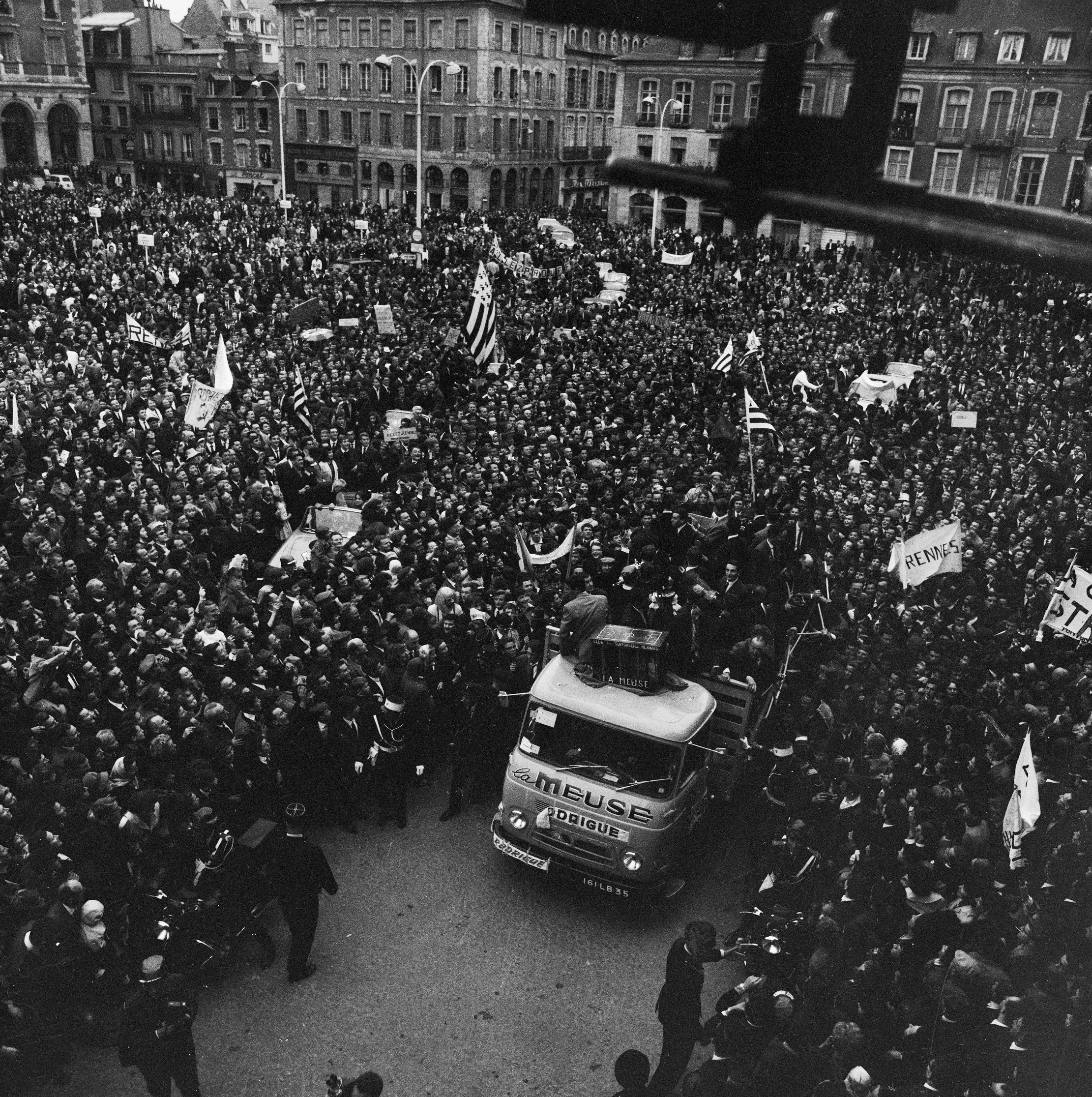 Coupe de France de football 1965 - retour du stade rennais à Rennes, place de la mairie